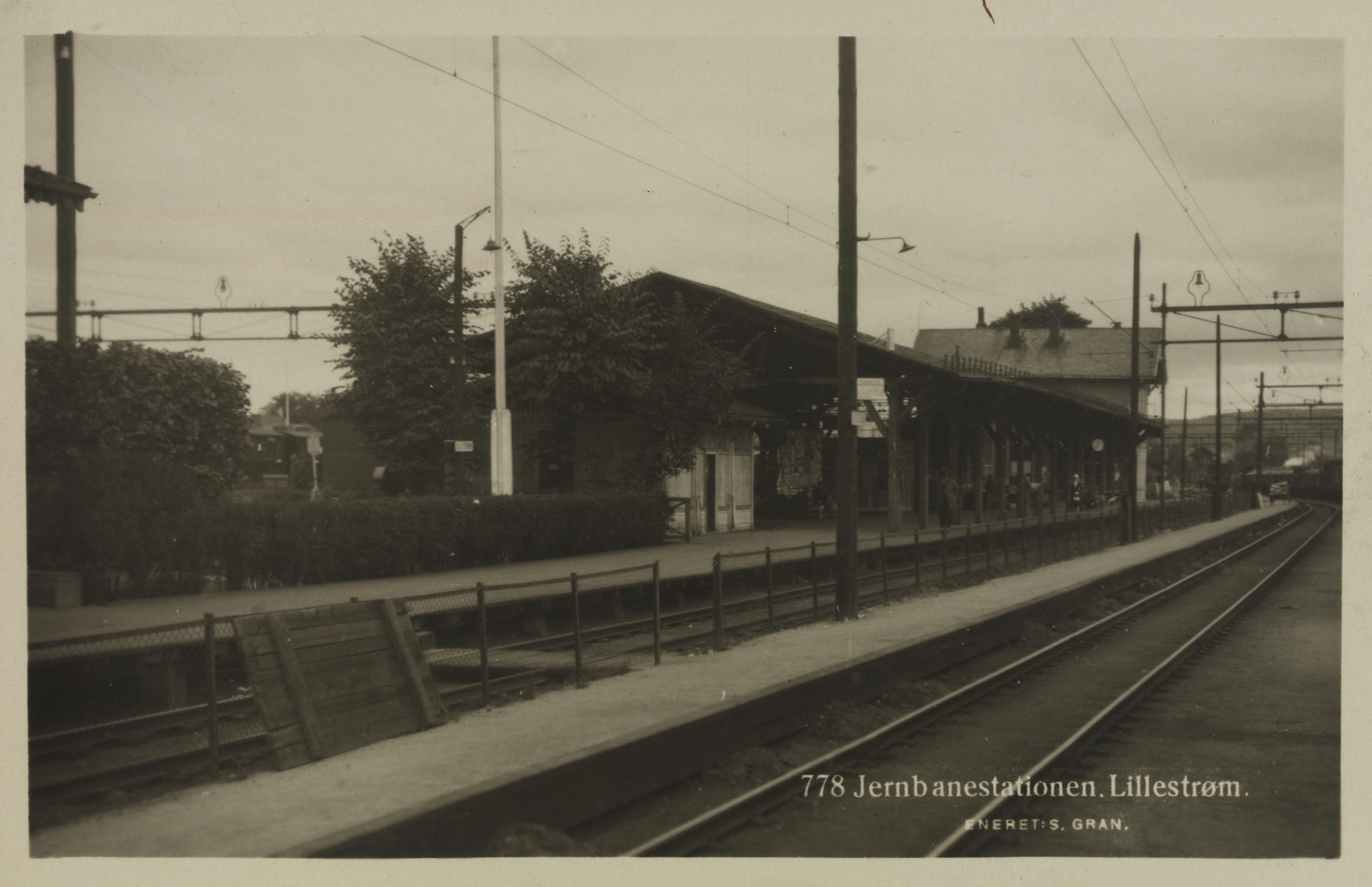 Bildet er hentet fra Nasjonalbibliotekets bildesamling Lillestrøm,Lillestrøm stasjon, Skedsmo, Akershus